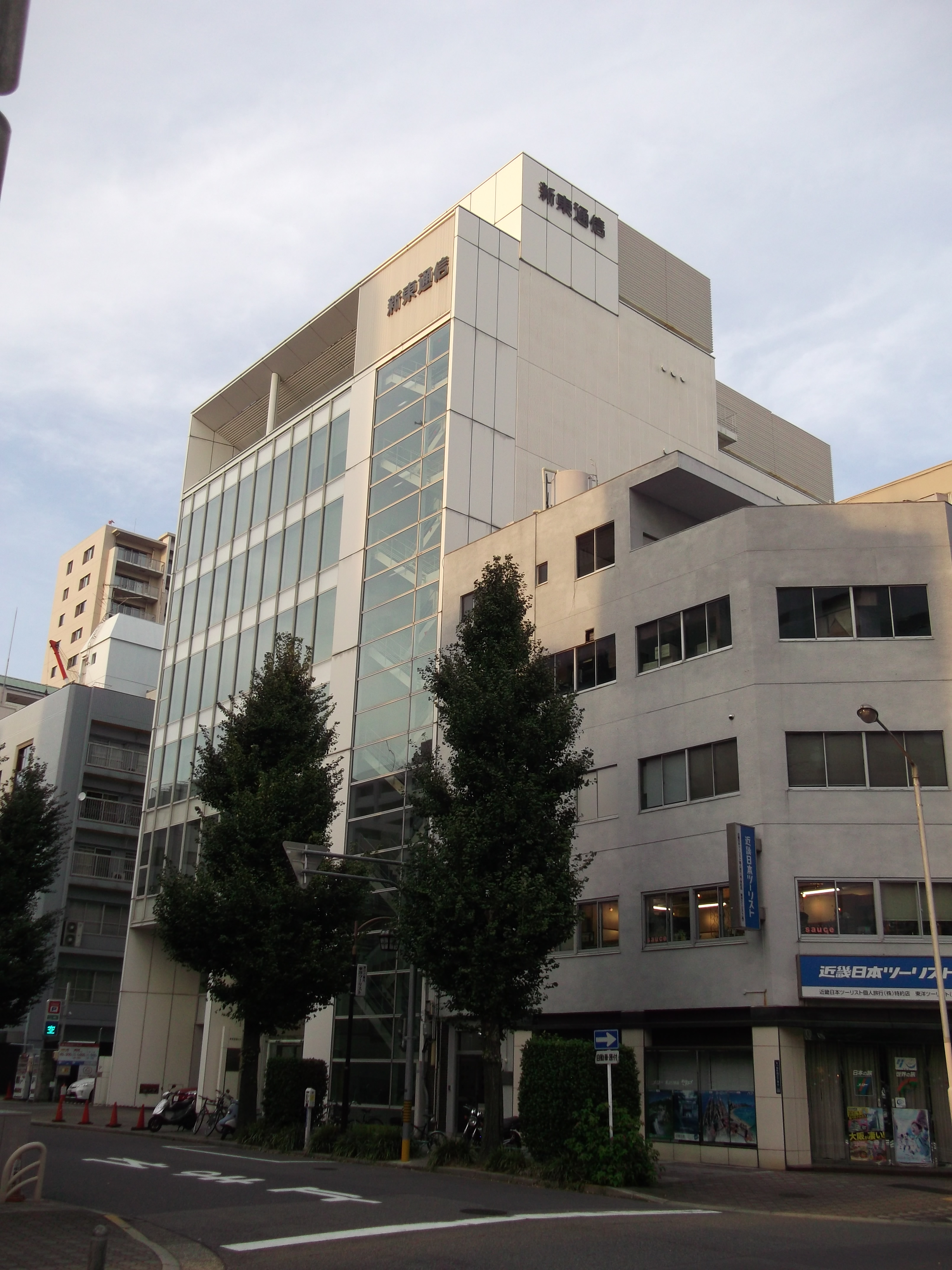 名古屋市中区の新東通信本社を南側公道西側より撮影